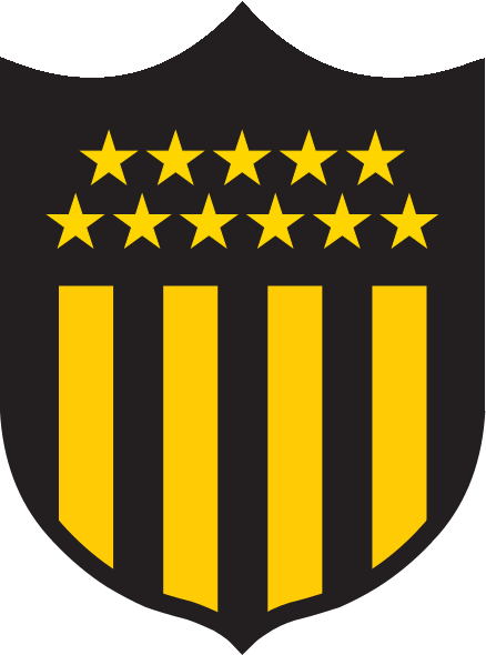 Logo of Uruguayan Club Atlético Peñarol de Montevideo.